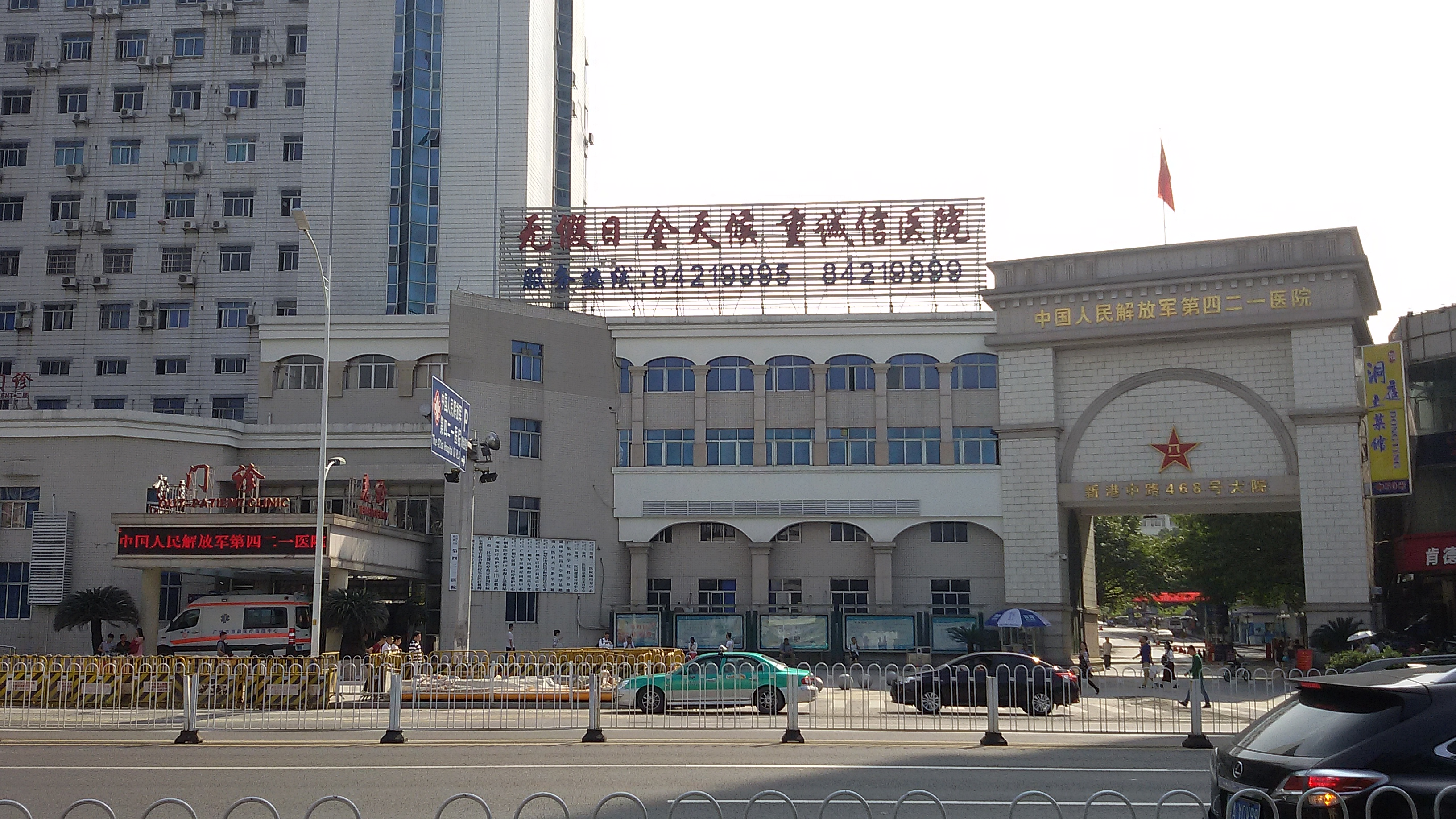 粵語: 中國人民解放軍第四二一醫院